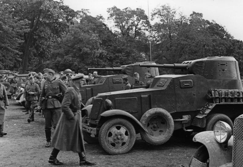 9785c/Besprechungen zwischen deutschen und sowjetrussischen Offizieren in Lublin. Deutsche Soldaten besichtigen hier sowjetische Panzerspähwagen in Lublin. P.K.-Atl.2.10.39 [Herausgabedatum] fr. OKW.